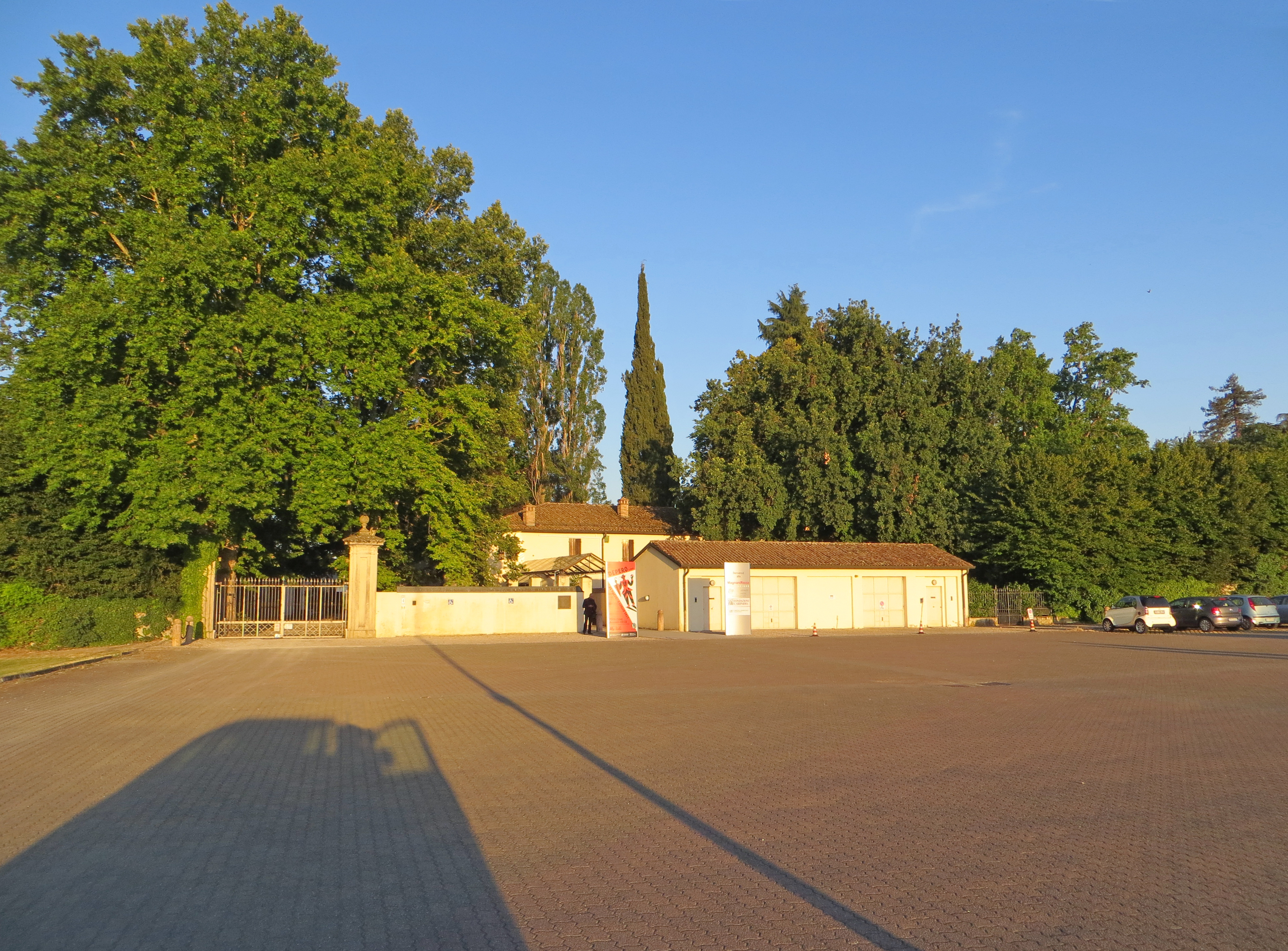 Villa Magnani (Mamiano) - ingresso pedonale del parco